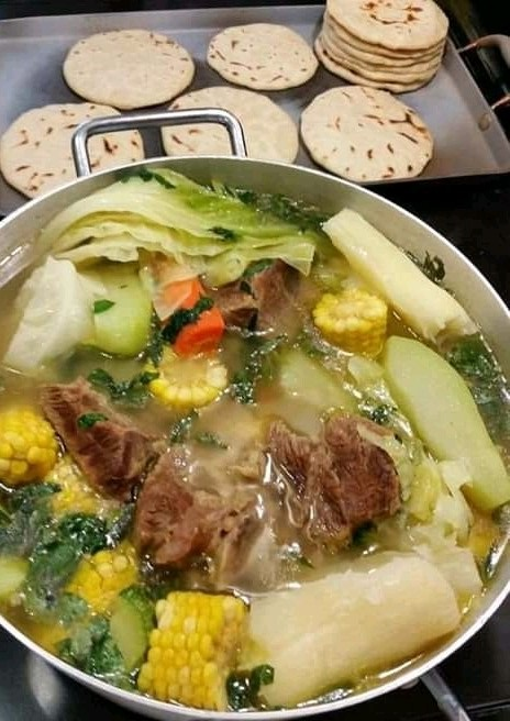 La olla de carne es un cocido tradicional costarricense.